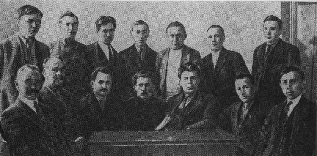 Коллективное фото казанской интеллигенции ( 1925-1926 гг)